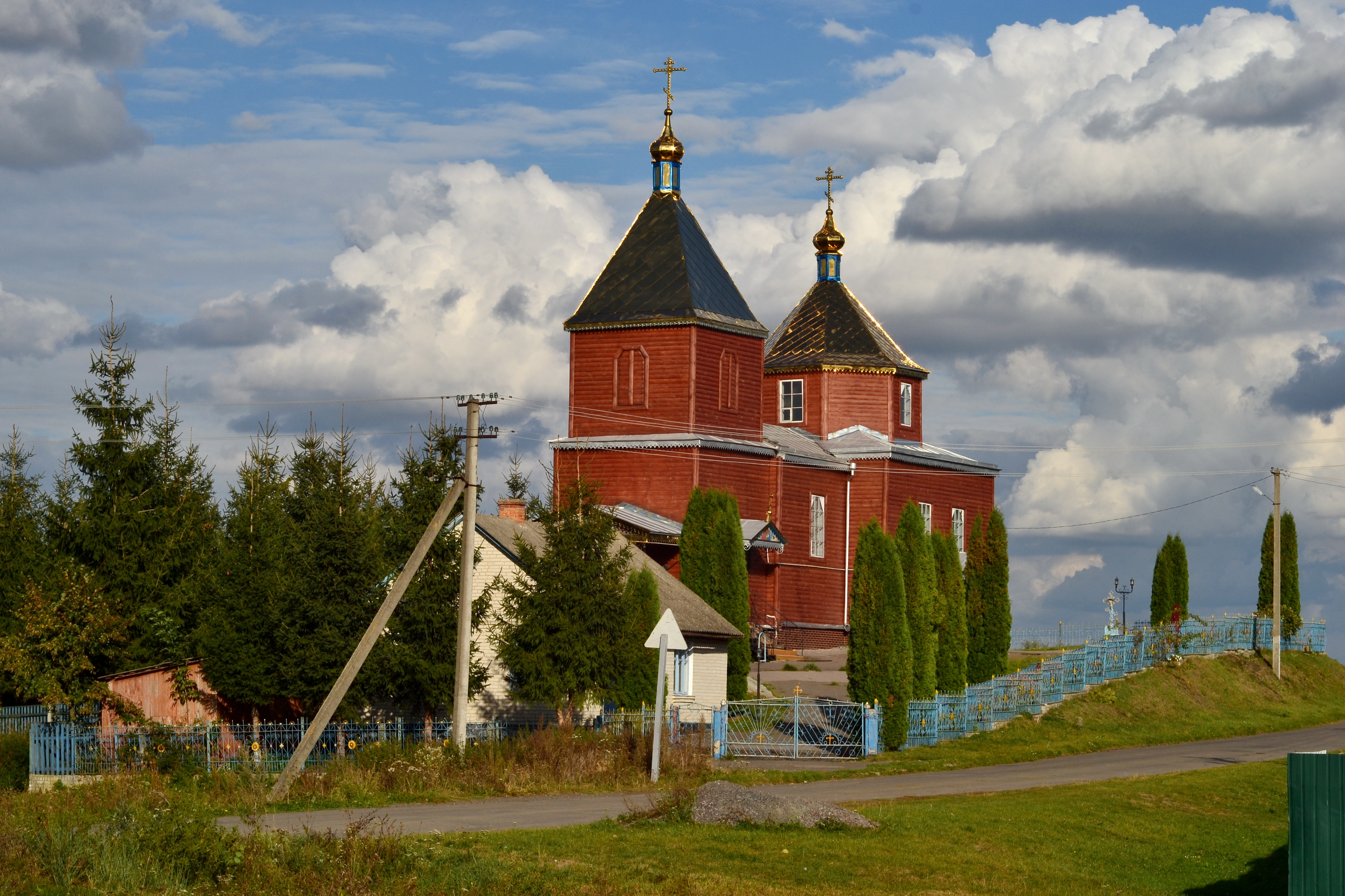 Церква Введення в храм Пресвятої Богородиці (дер.) (1708-1931 роки) - вигляд з південного заходу - Печихвости Горохівський район Волинська область Україна